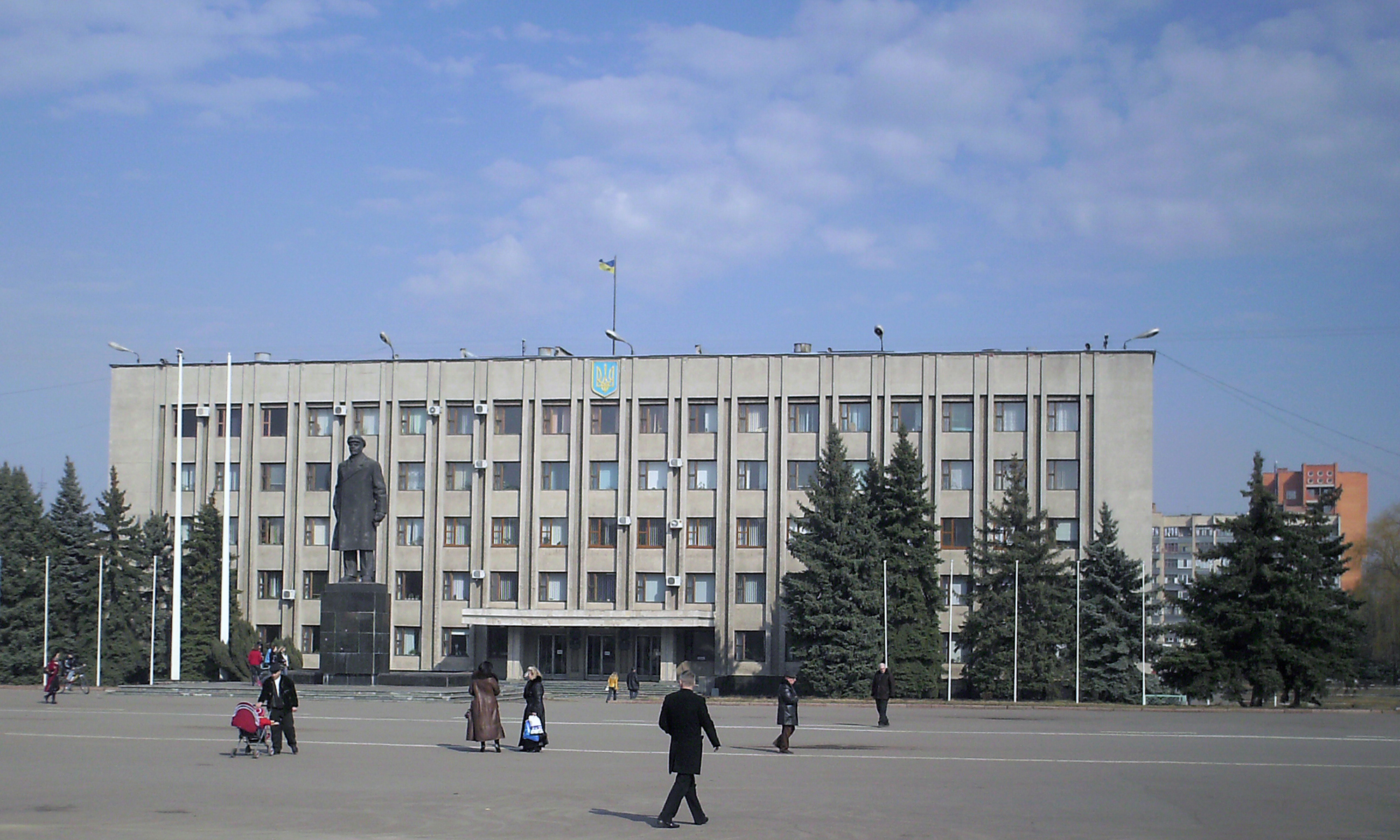 Слов'янськ, пл. Жовтневої Революції